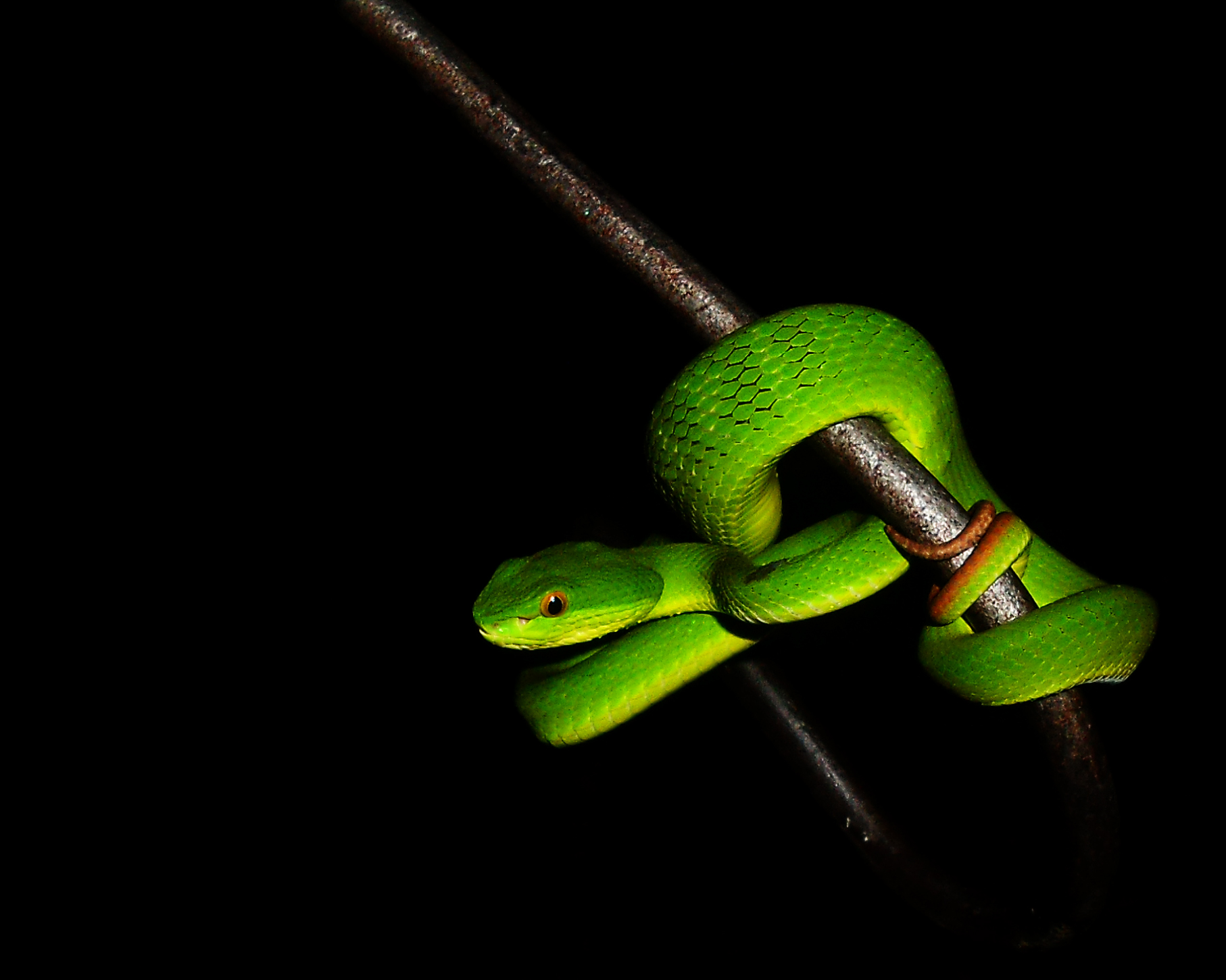 Trimeresurus albolabris pada sebuah tongkat ular, Dramaga, Bogor